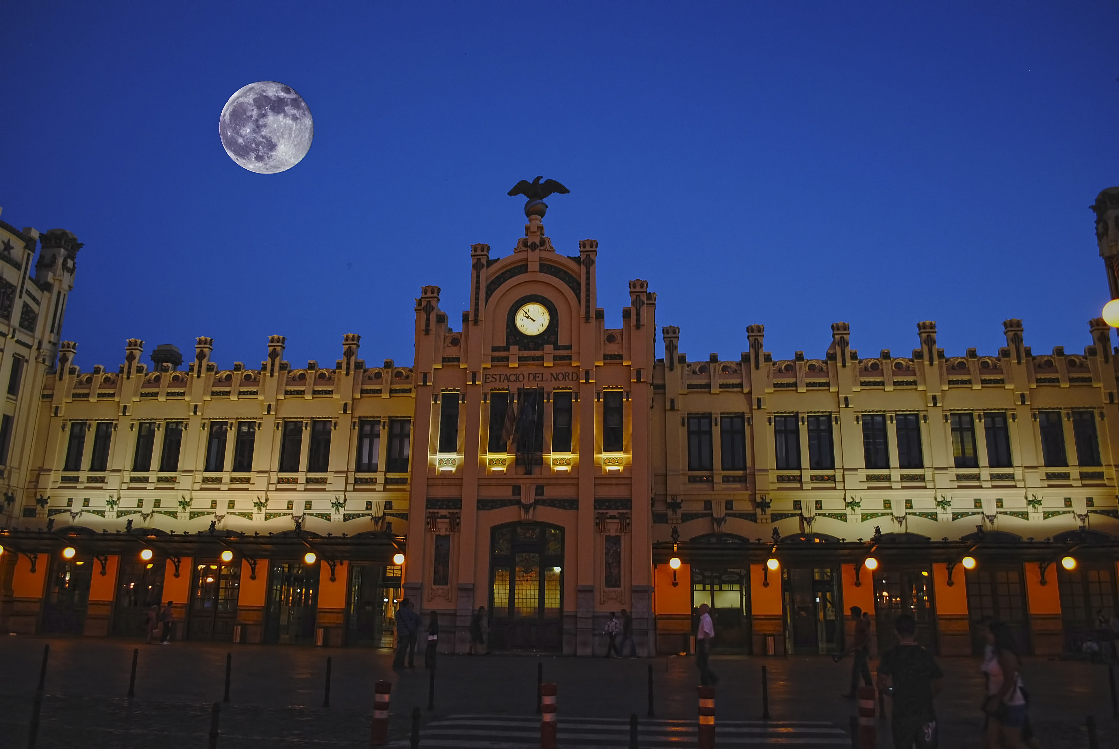 Fachada de la estación de Valencia-Norte al anochecer.